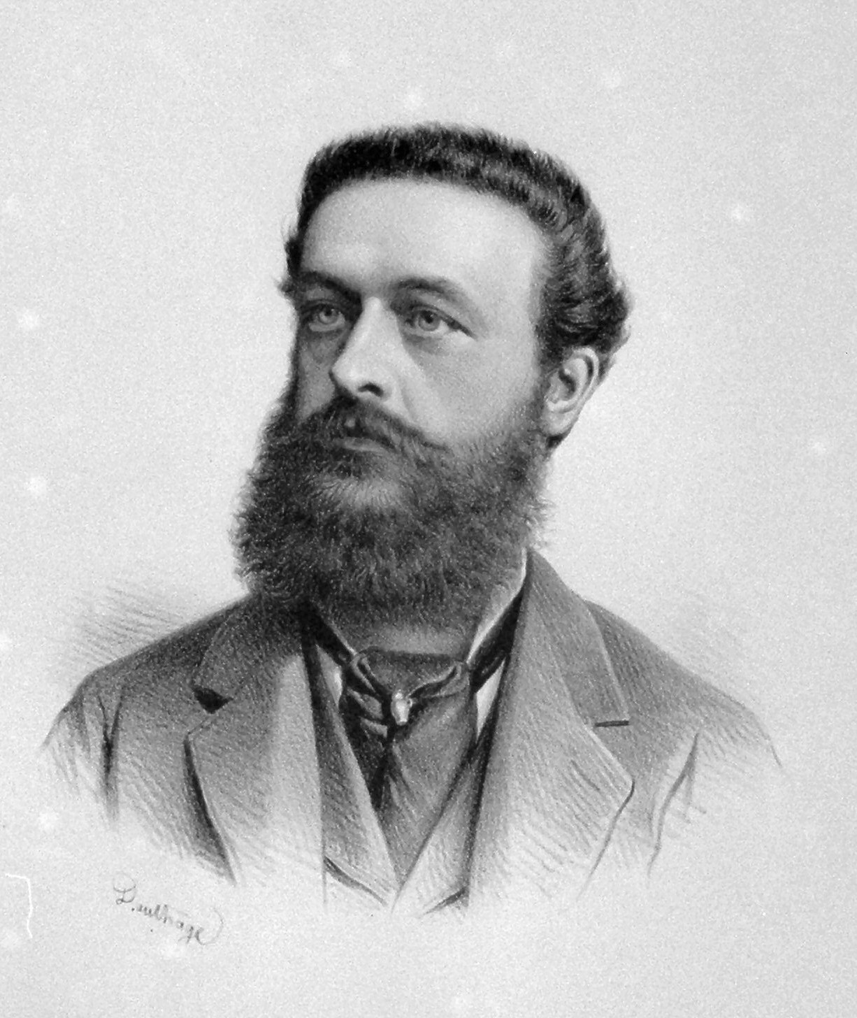 Josef Oswald jun. von Thun und Hohenstein (1849-1913), Graf, Jurist, Diplomat, Abgeordneter zum böhmischen Landtag. Lithographie von Adolf Dauthage, 1880